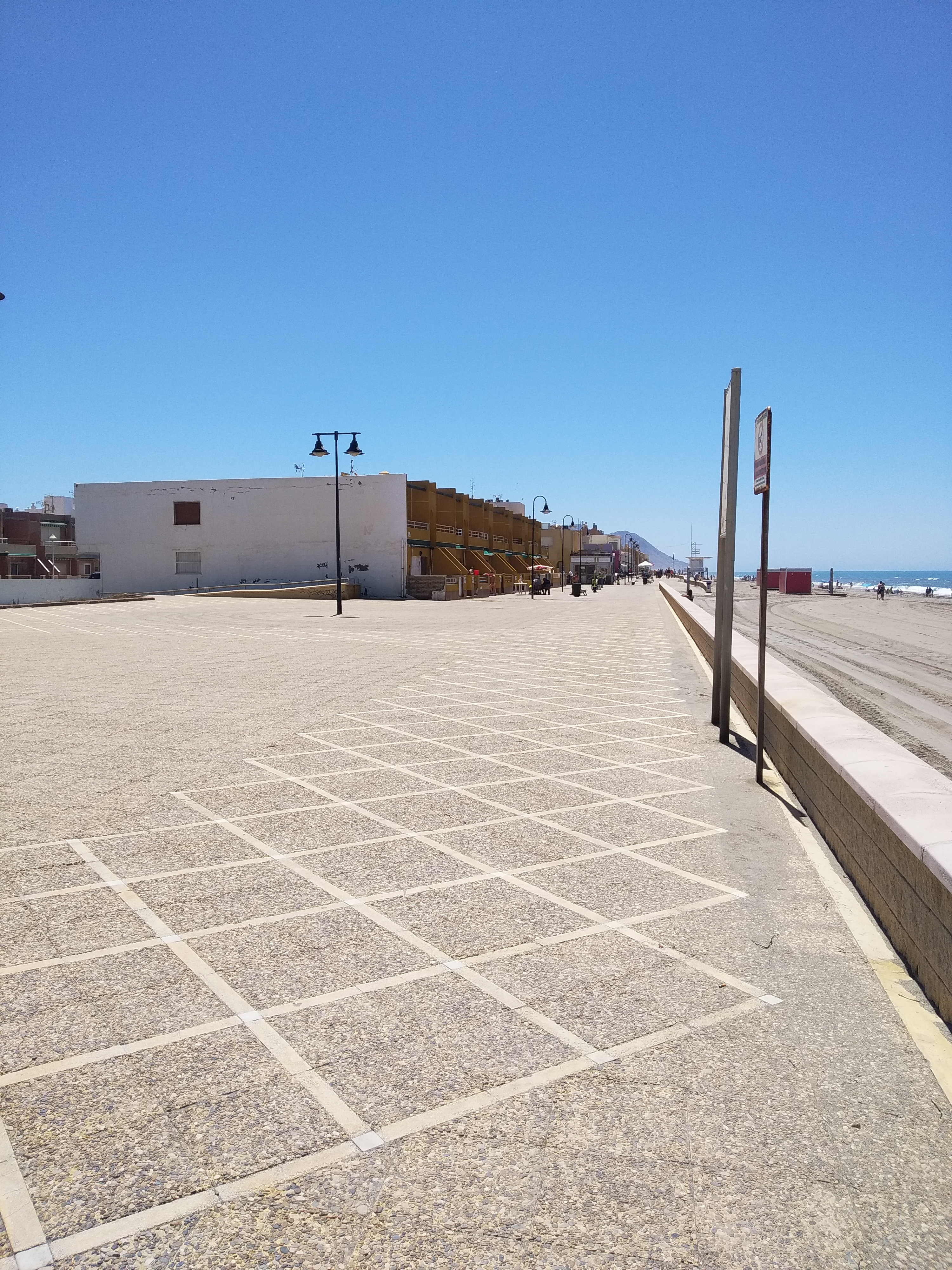 Paseo marítimo de la barriada de Cabo de Gata. Tiene un extensión de medio kilómetro.